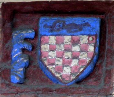 Asti , Stemma De Regibus. Foto fatta da me Faberh 2006